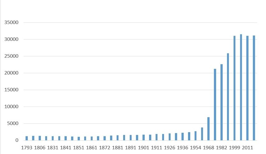 Гистограмма демографических изменений Плезира